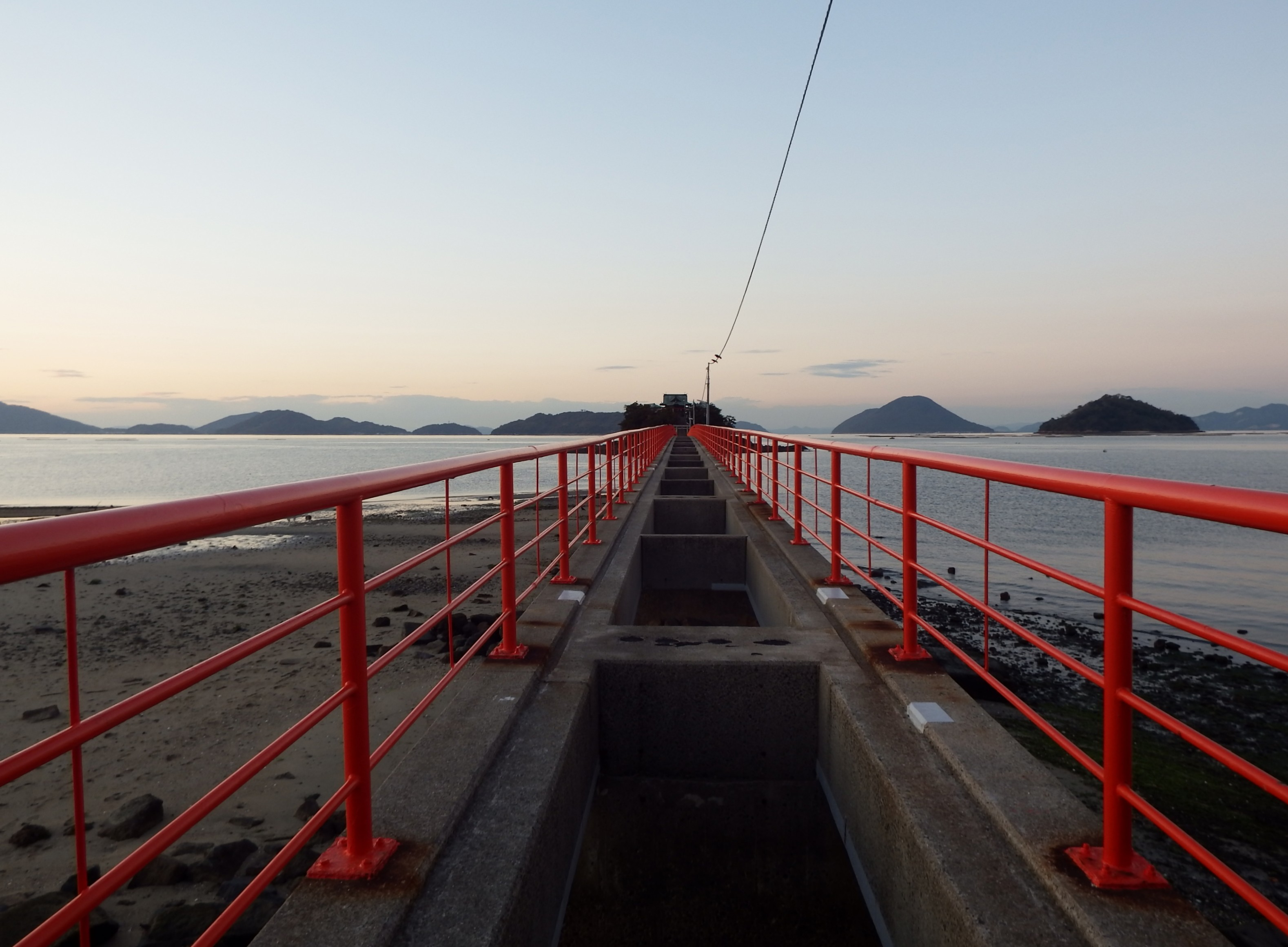 津島神社の橋